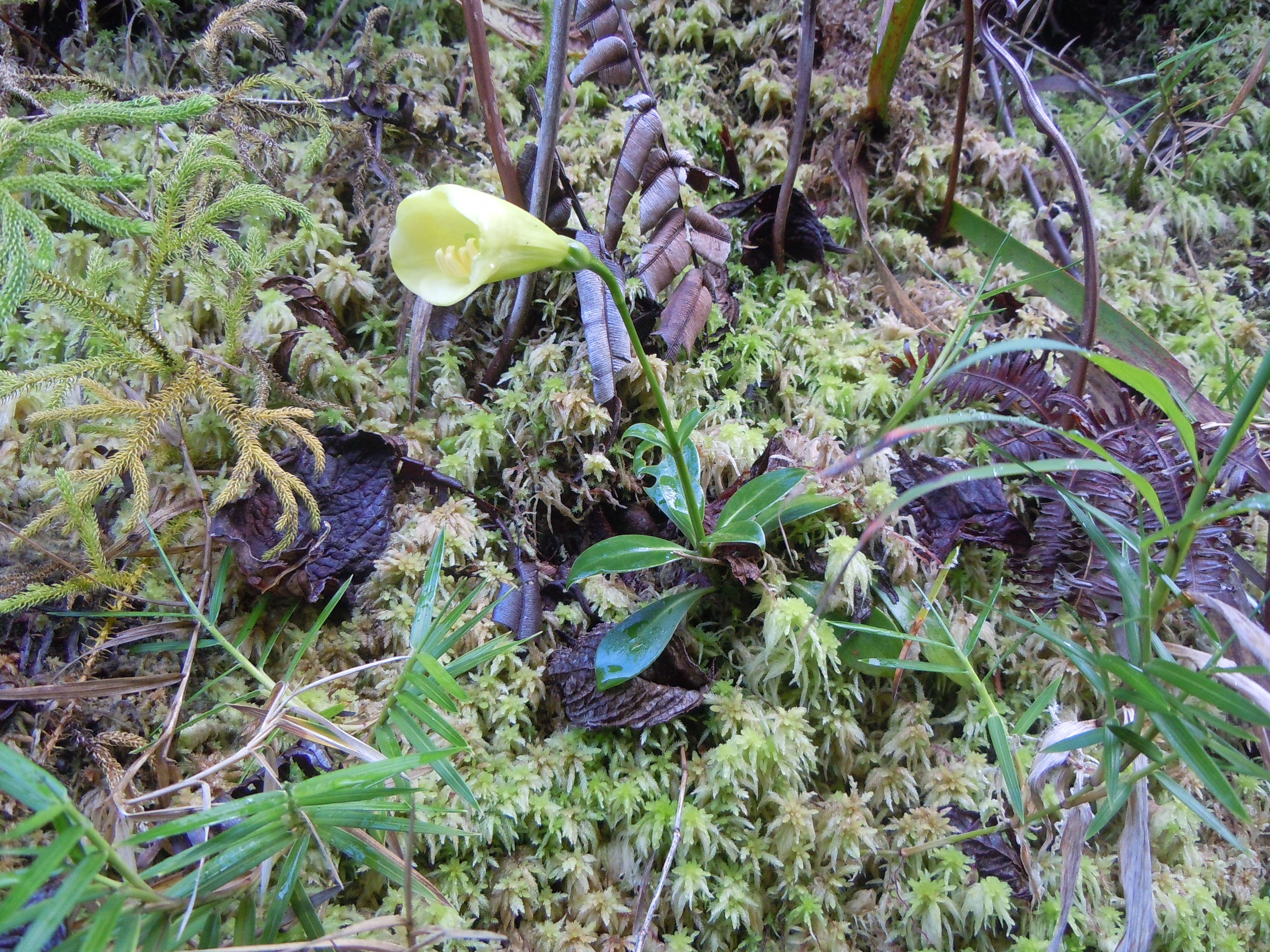 Irlbachia frigida, La Soufrière, Guadeloupe